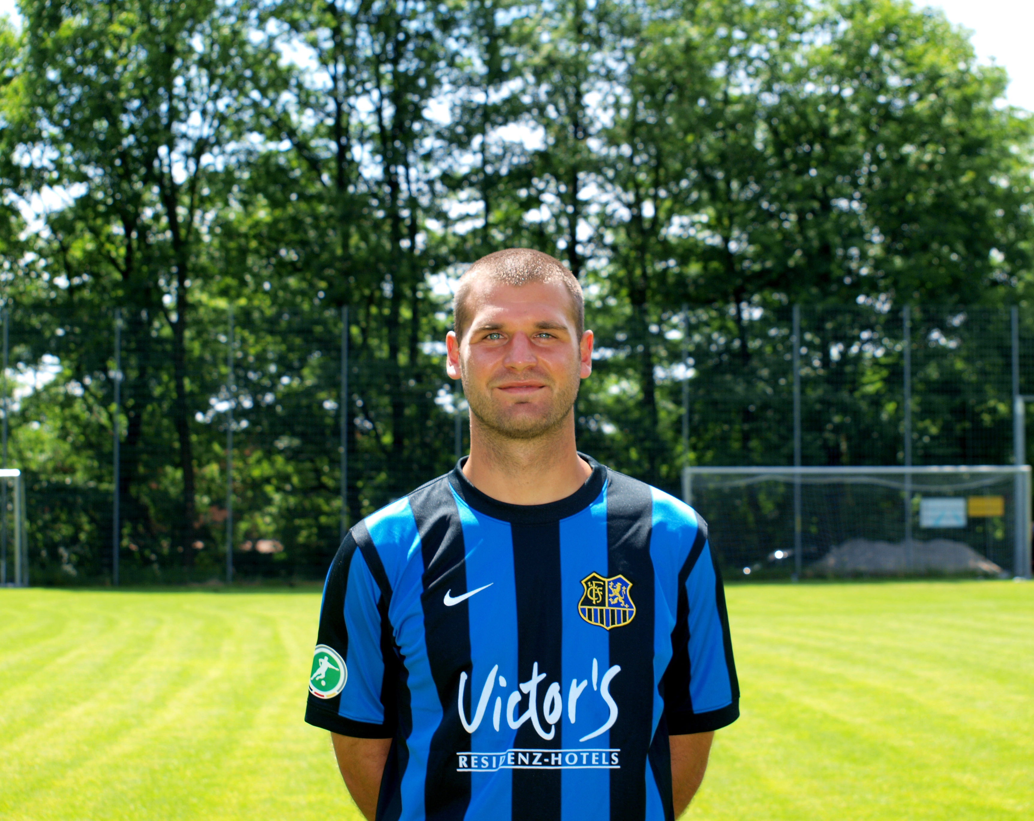 Markus Fuchs im Juli 2010